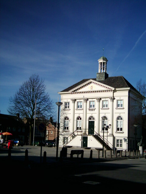 ZundertCity Hall